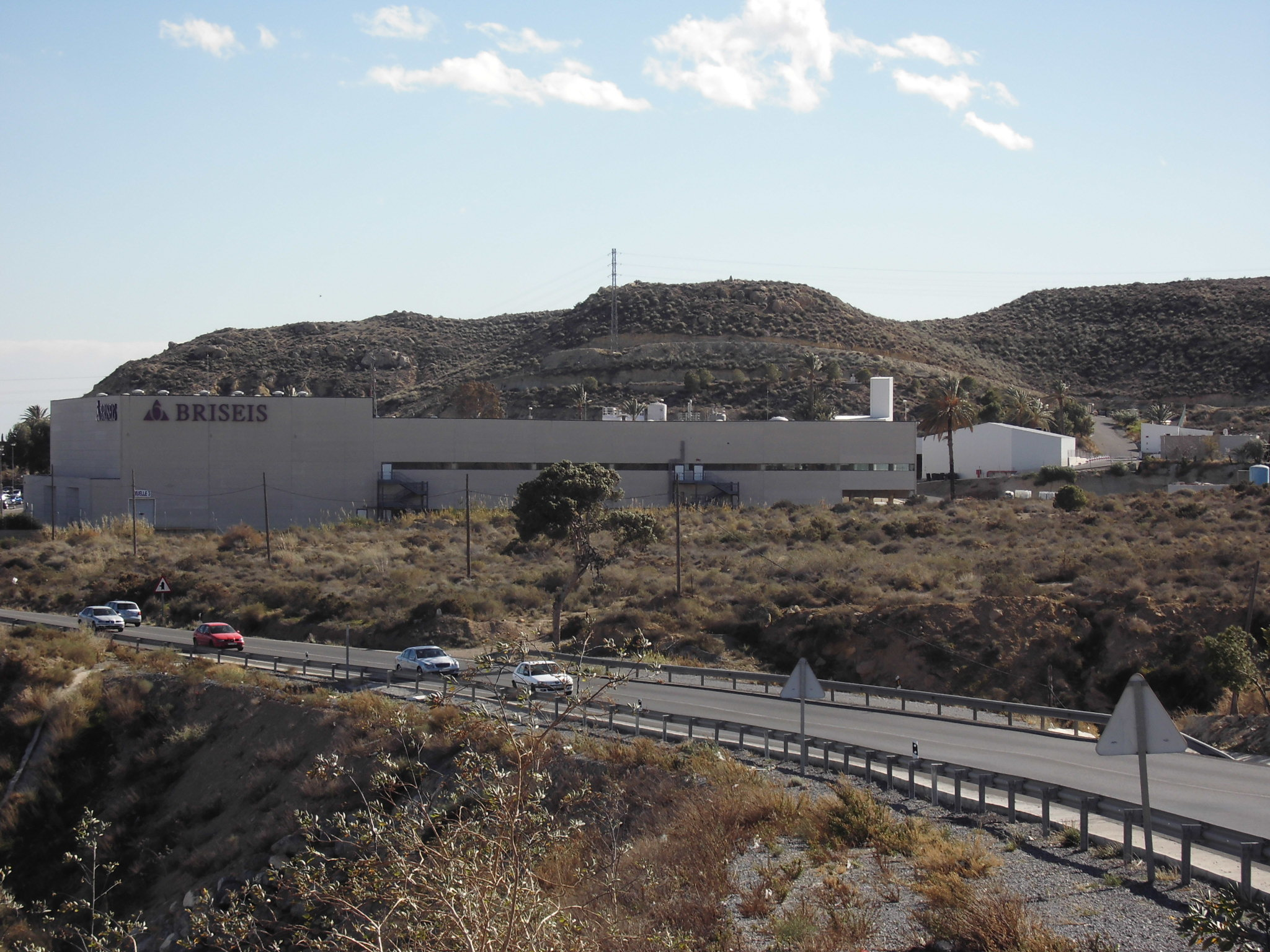 Fotografía de la planta de fabricación industrial de Perfumes Briseis S.A. en Benahadux, provincia de Almería, Andalucía, España.